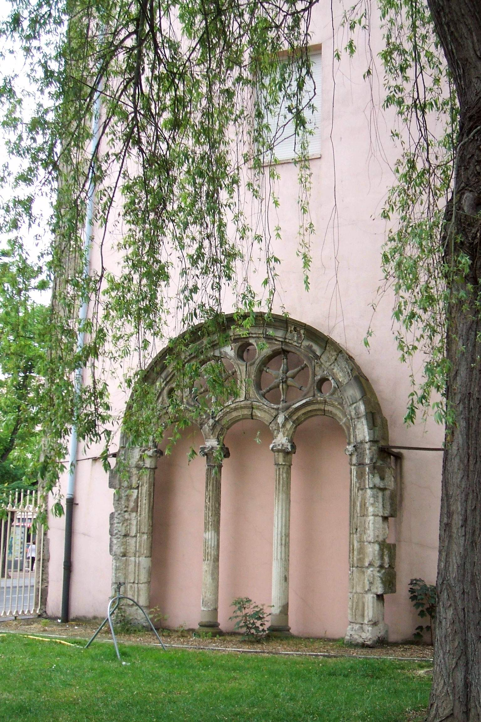 Arquería del desaparecido Convento de Santo Domingo de Vitoria-Gasteiz, en los jardines de la Residencia San Prudencio